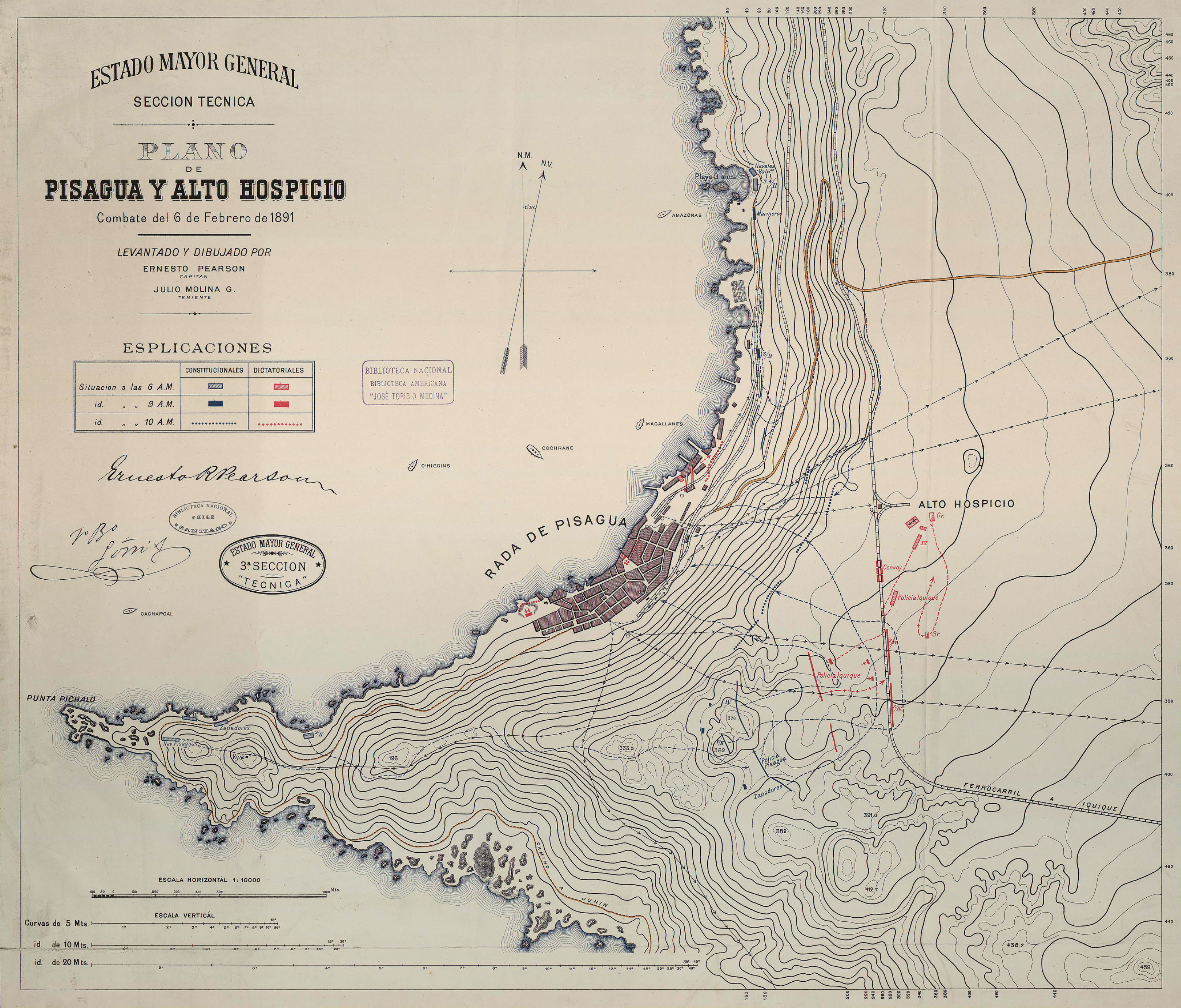 Plano de Pisagüa y Alto Hospicio : combate del 6 de febrero 1891 [Material cartográfico] Levantado y dibujado por Ernesto Pearson Sinclair y Julio Molina, Estado Mayor general.